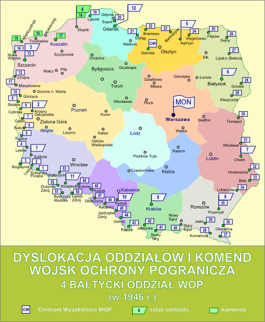 Dyslokacja oddziałów i komend Wojsk Ochrony Pogranicza w październiku 1946 r. - 4 Bałtycki Oddział WOP